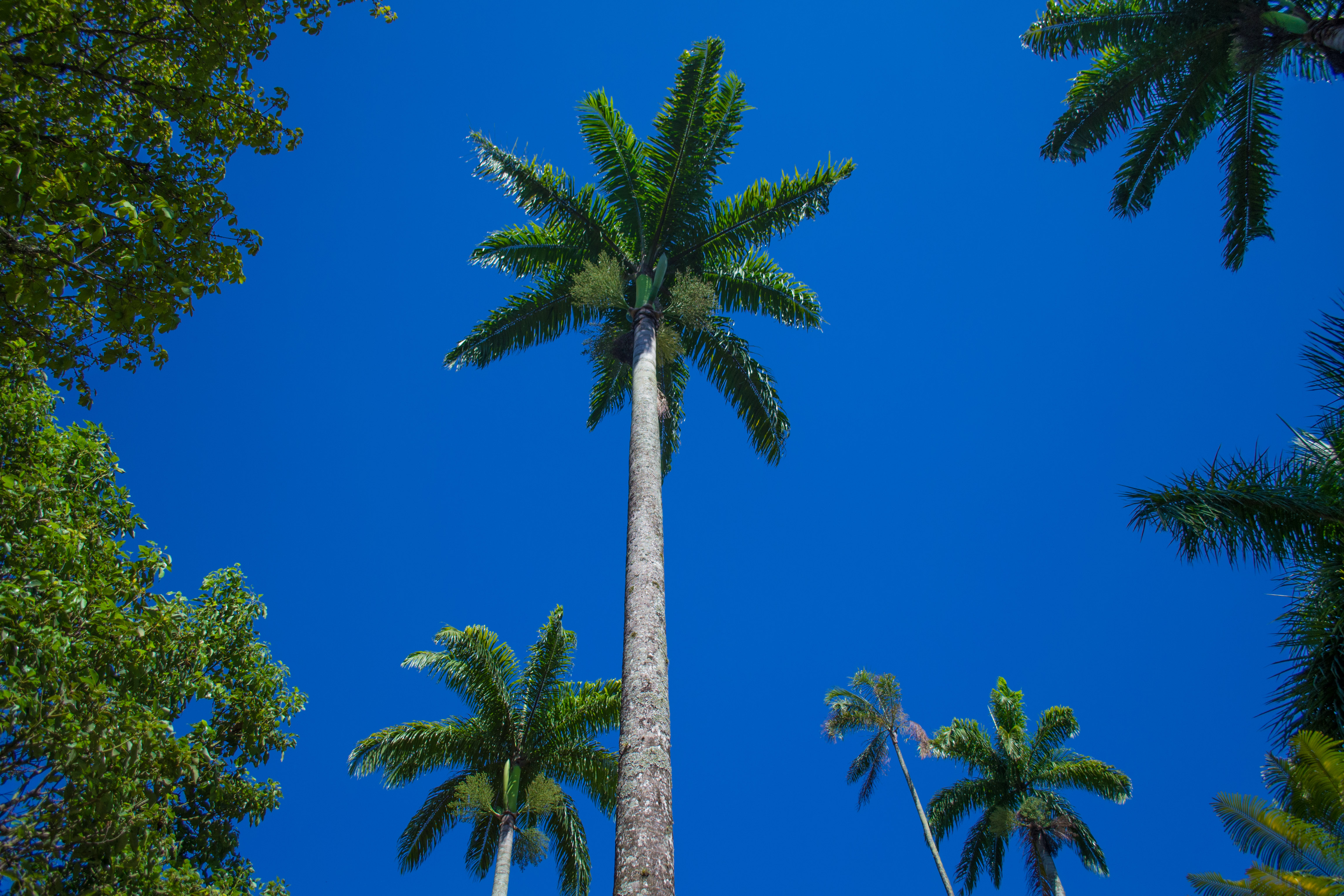 Palmeiras Imperiais Jardim Botânico Rio de Janeiro